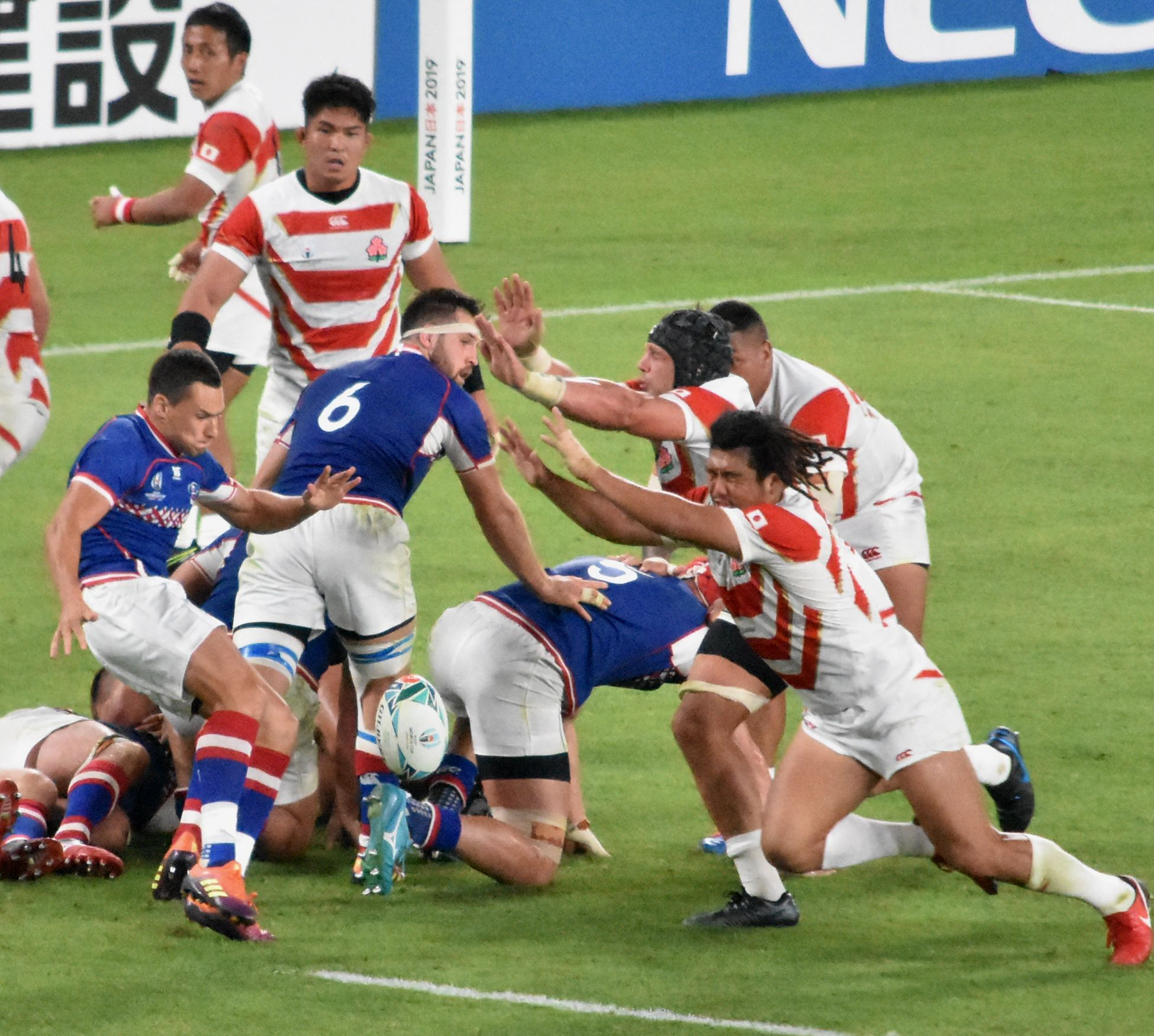 堀江 翔太